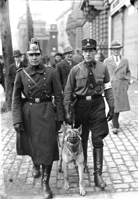 Die große Reichstagswahl am 5. März 1933. Nationalsozialistische Hilfspolizei im Verein mit Schutzpolizei Beamten sorgen in den Straßen Berlins für Ruhe und Ordnung am Wahltage.